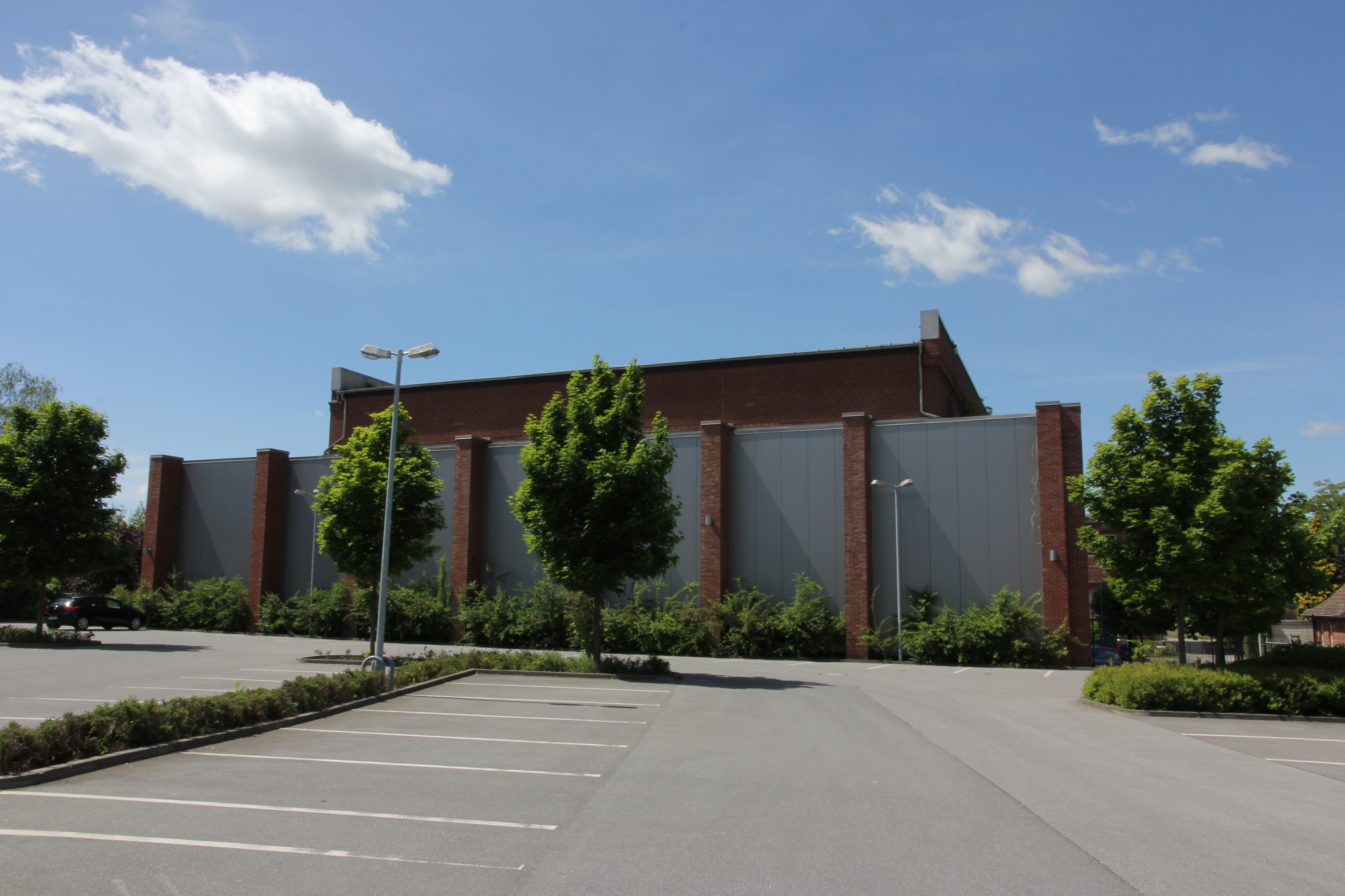 Gebäude der ehemaligen Zeche Alter Hellweg in Unna